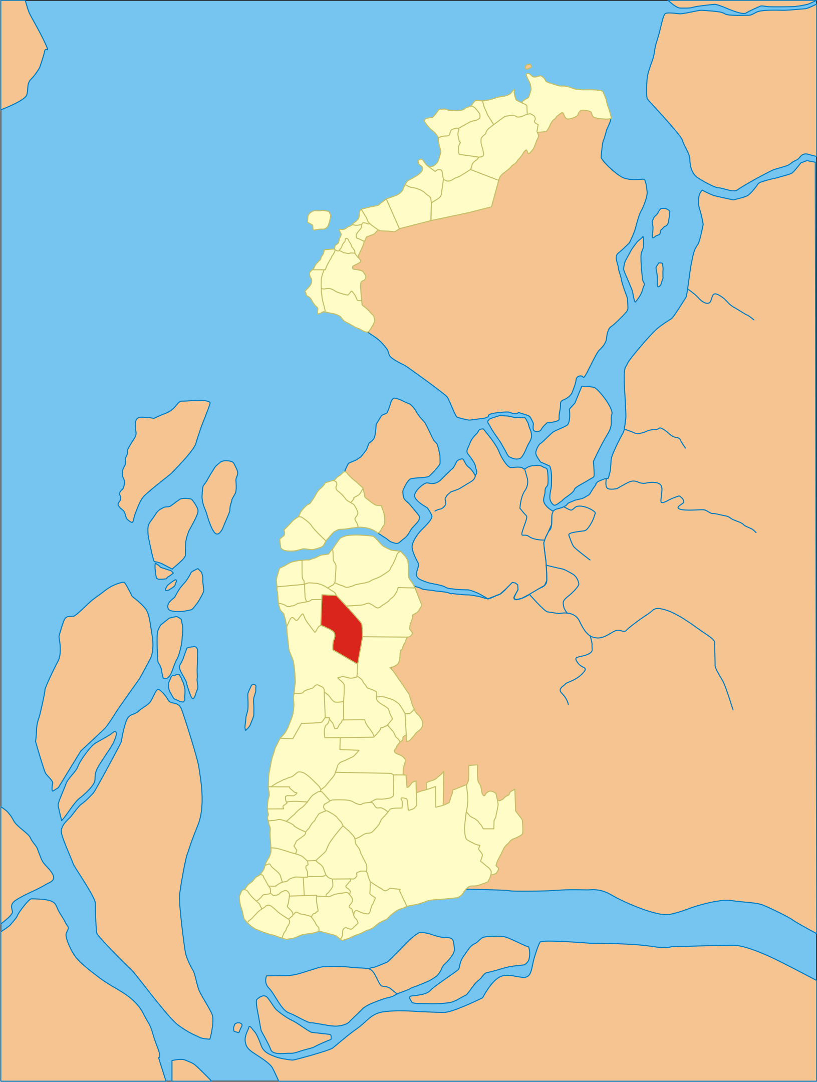 Localização do bairro em Belém do Pará